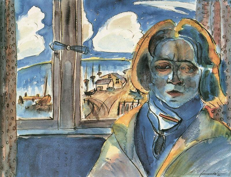 Mädchen am Fenster (Sonia Gramatté). Aquarell